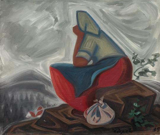 Tvorba Josefa Čapka